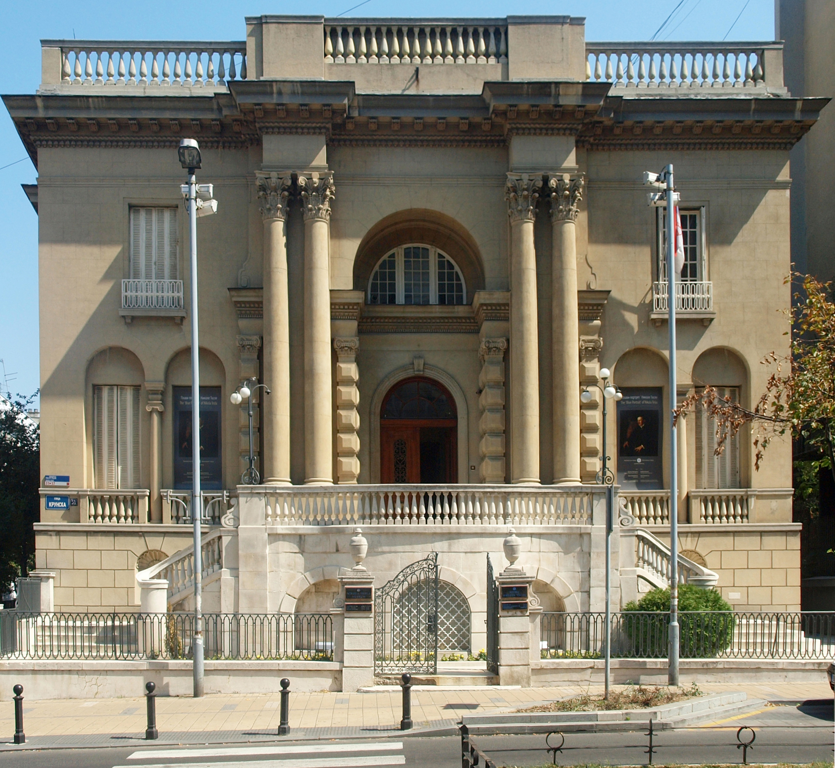 Het Nikola-Tesla-museum in Belgrado.